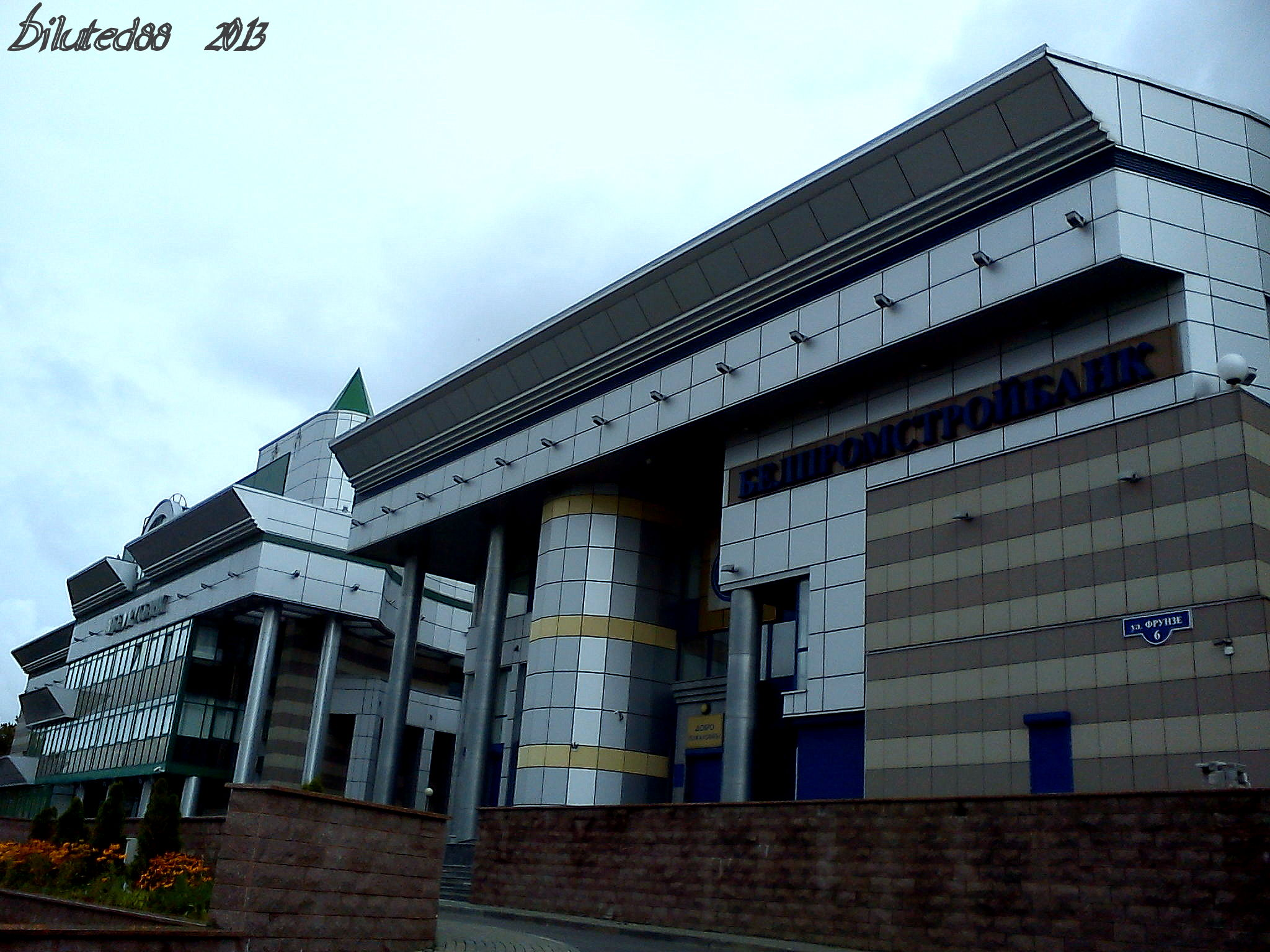 БПС-Сбербанк ... BPS-Sberbank